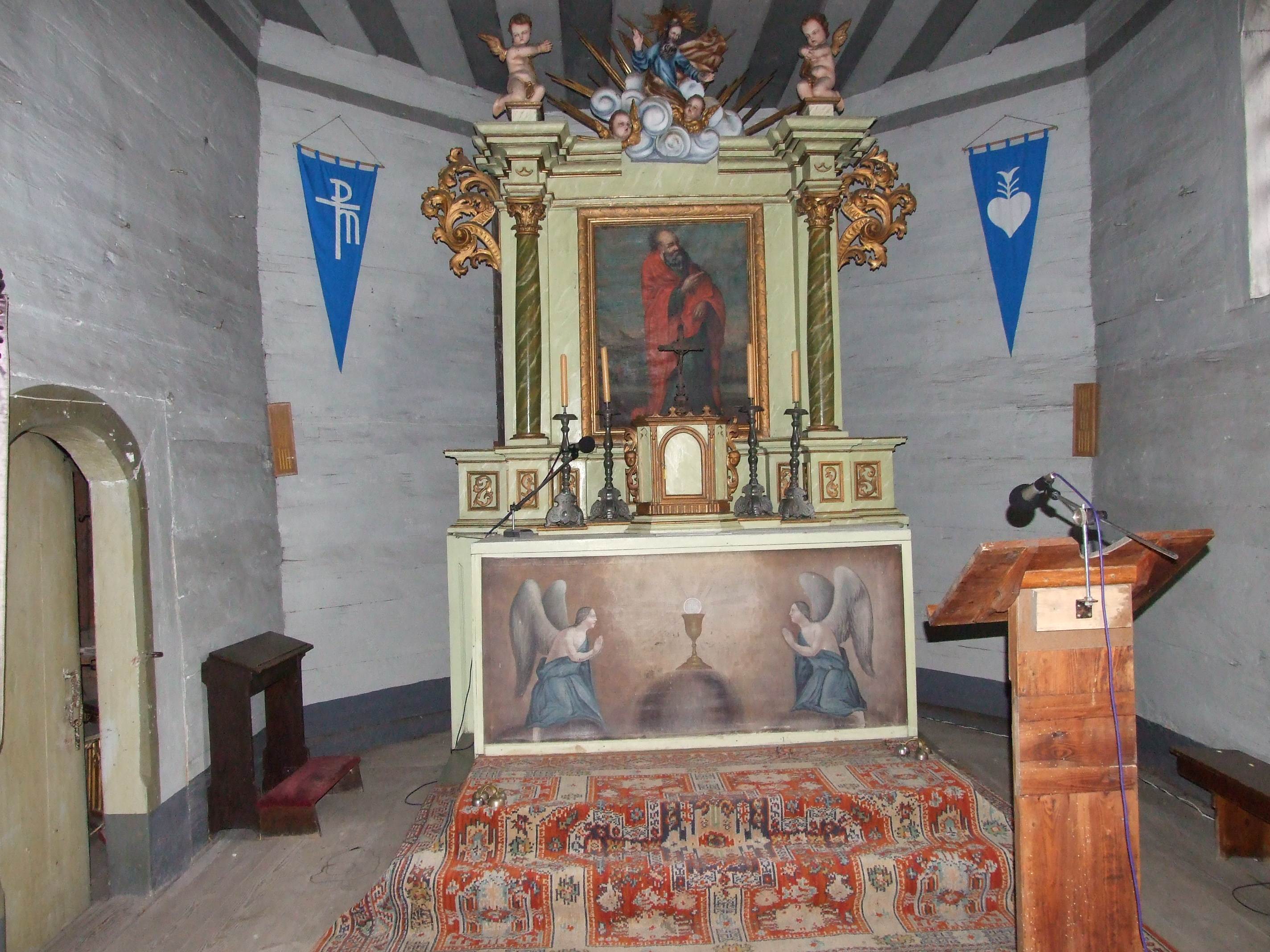 Kościół św. Marcina i Bartłomieja w Borkach Wielkich z 1697r.